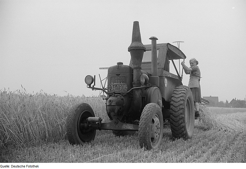 Original image description from the Deutsche Fotothek Getreideernte